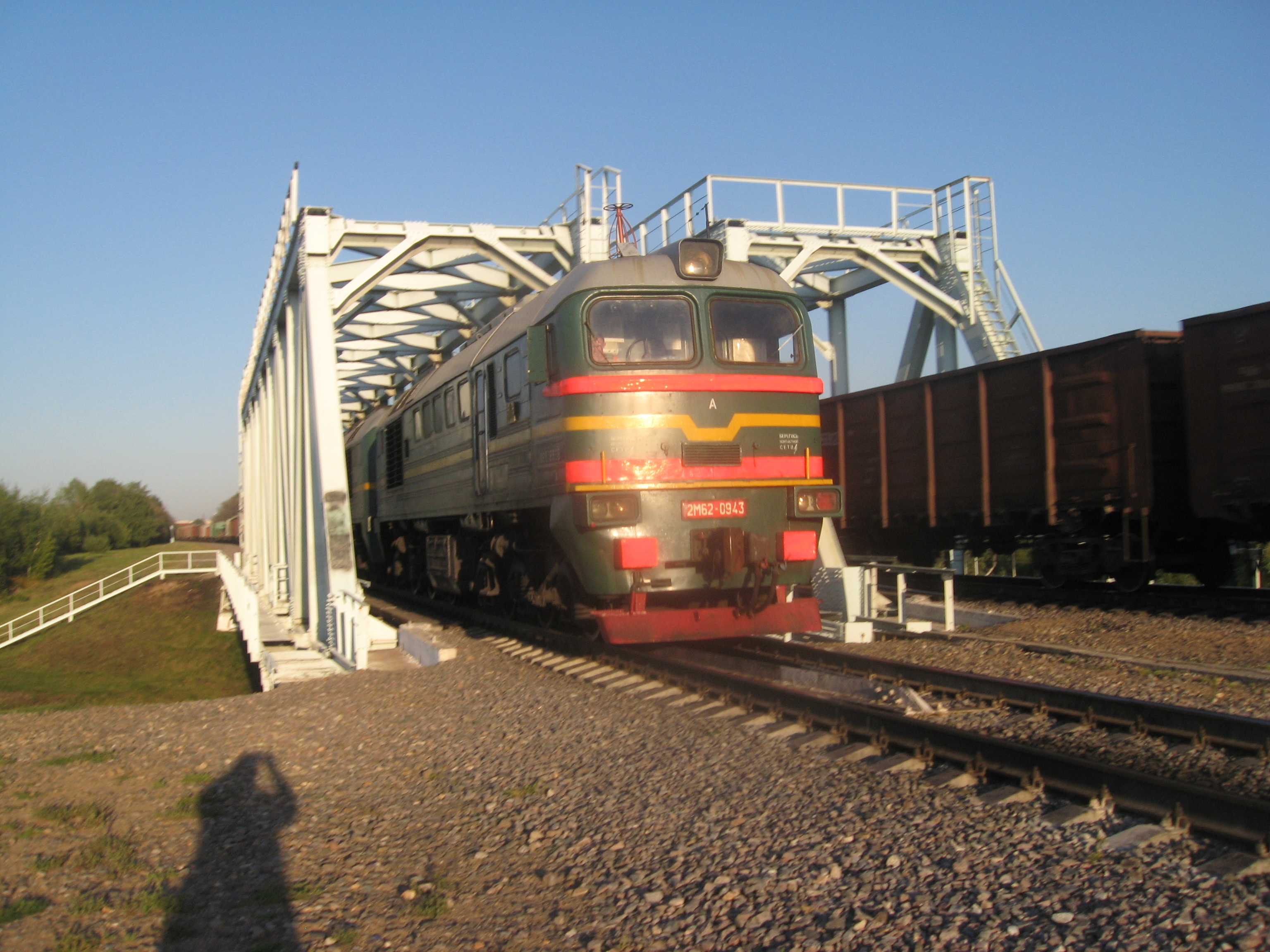 Тепловоз 2М62-0943 проезжает мост через через реку Лихоборка